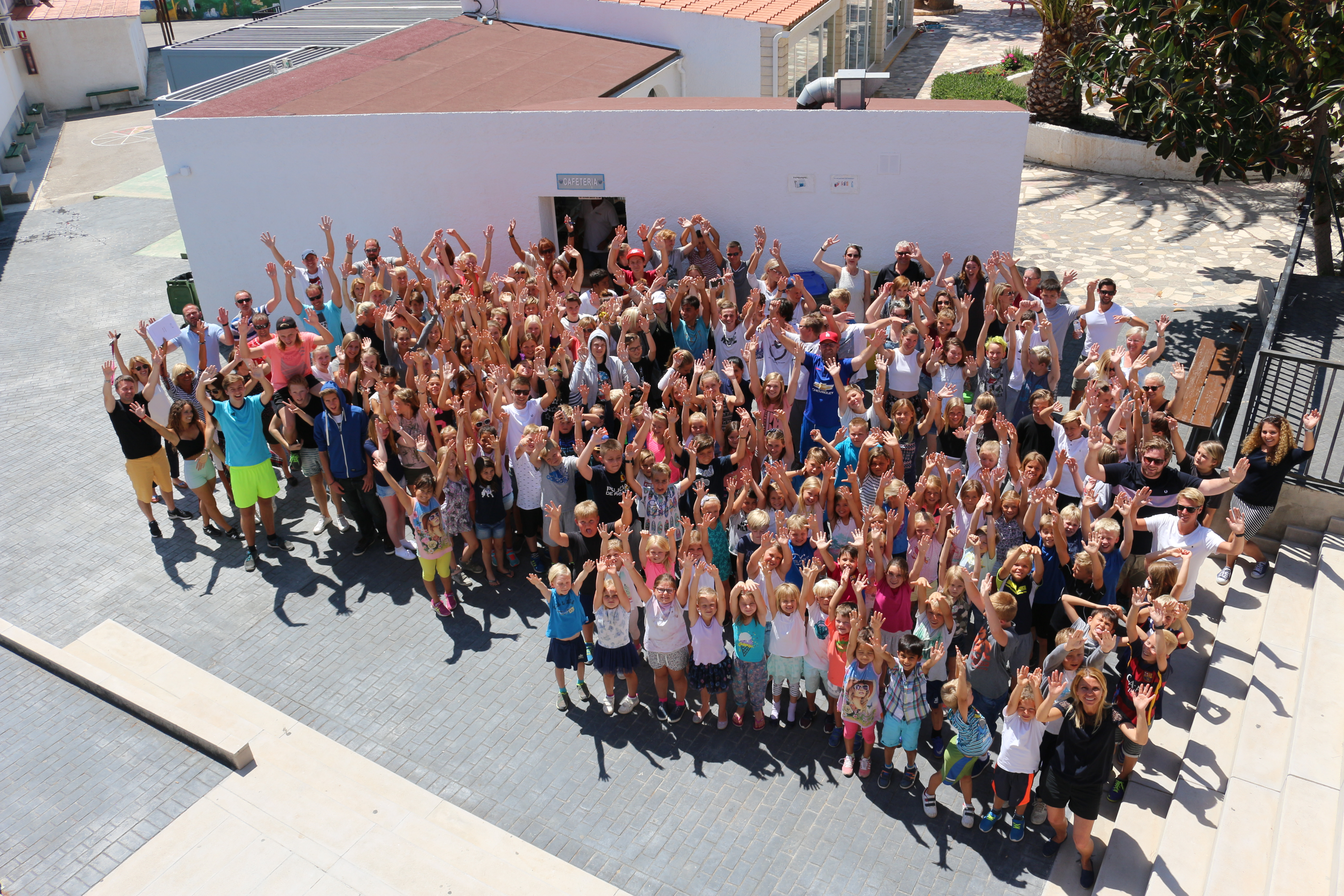 Elever ved Den norske skole Costa Blanca